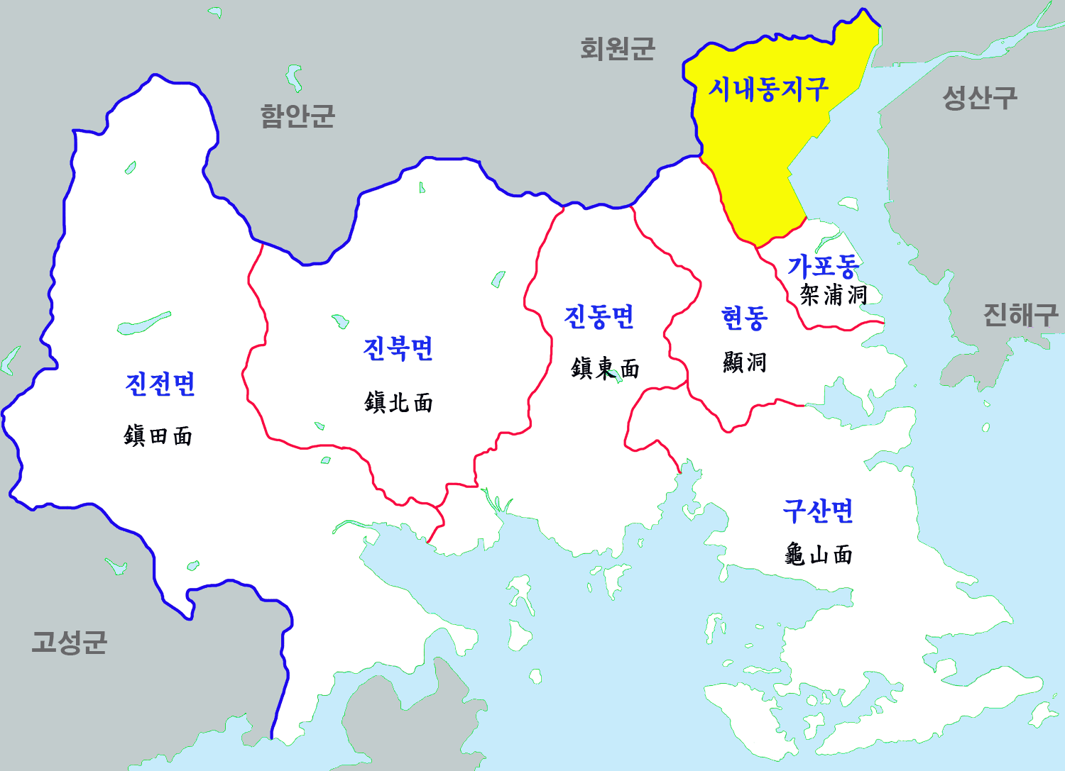 마산합포구 행정구역